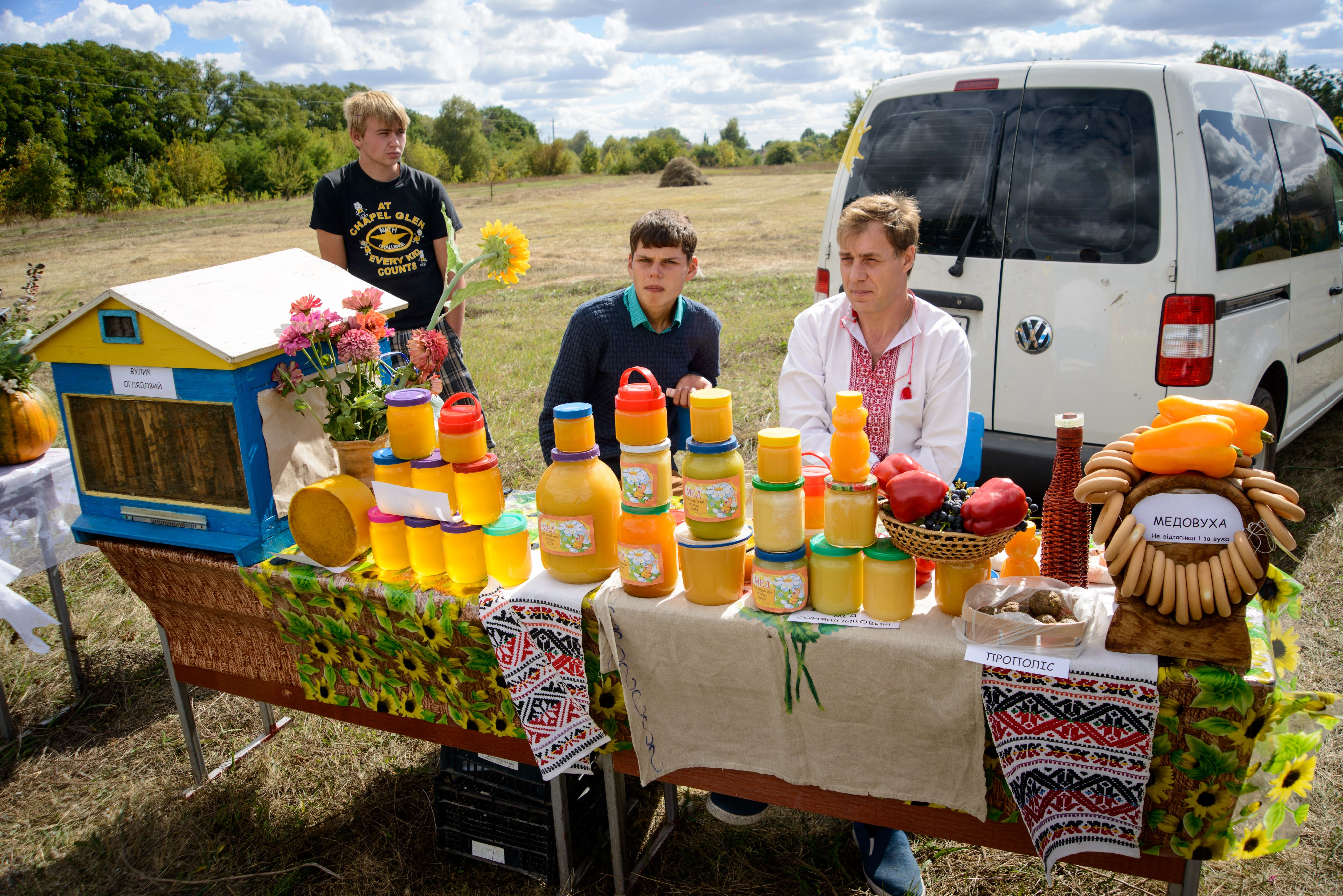 Продаж меду на ярмарку під час етнографічного фестивалю «Свіччине весілля» у 2016 році в Березовій Рудці Знято під час Вело-вікі-експедиція селами Гребінківського та Пирятинського районів